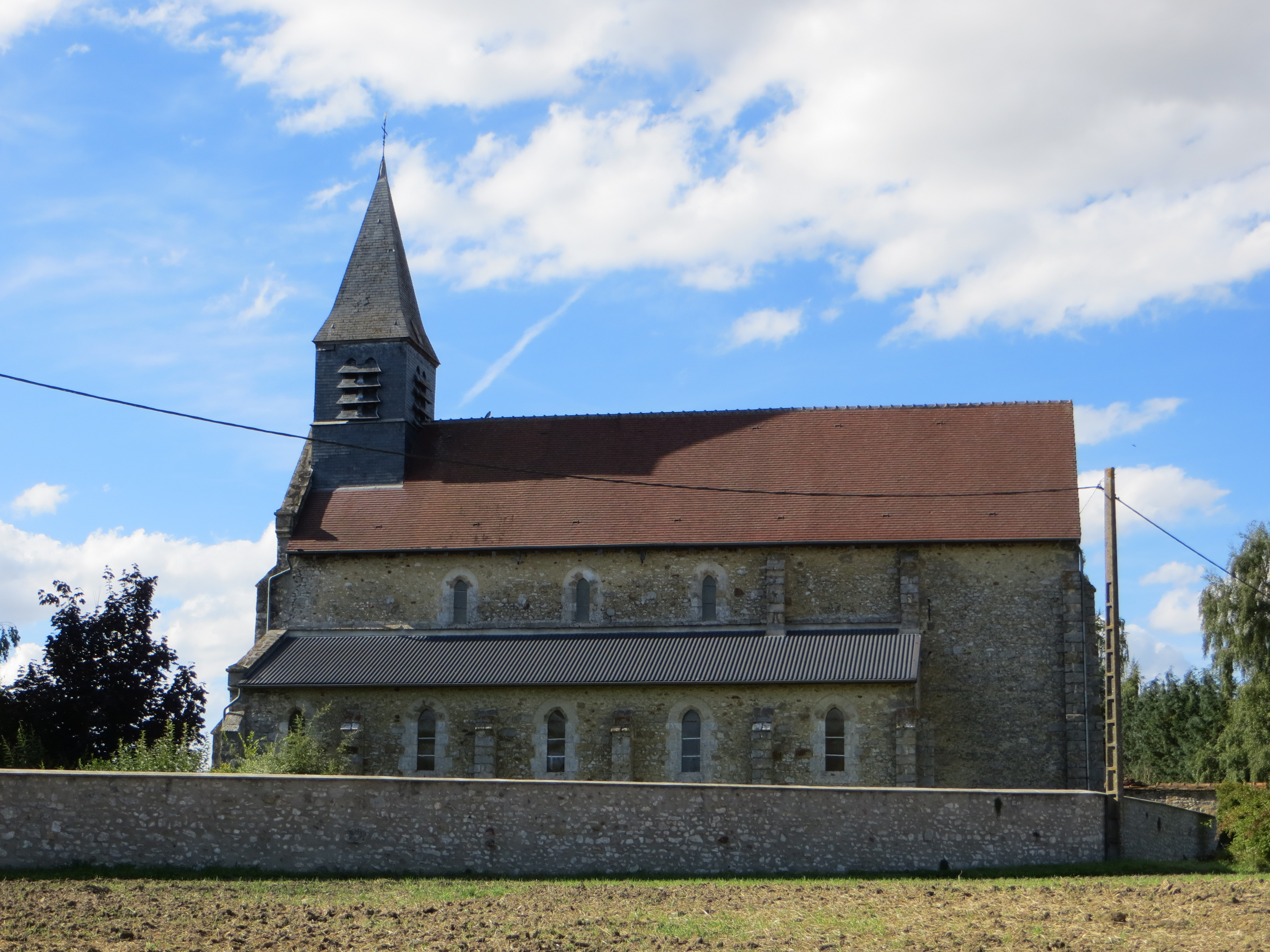 Vue générale de l'église